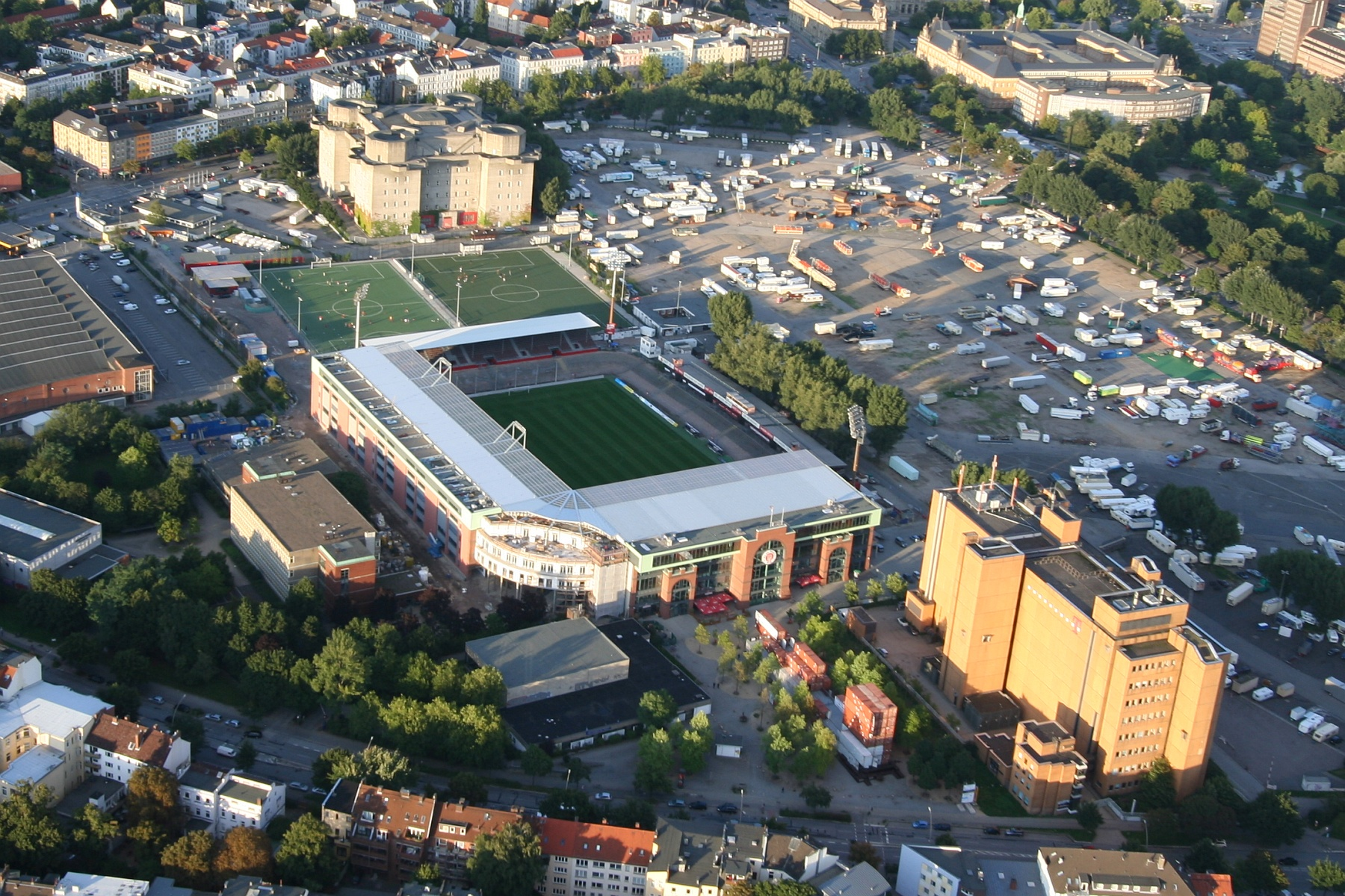 Heiligengeistfeld, Millerntor-Stadion